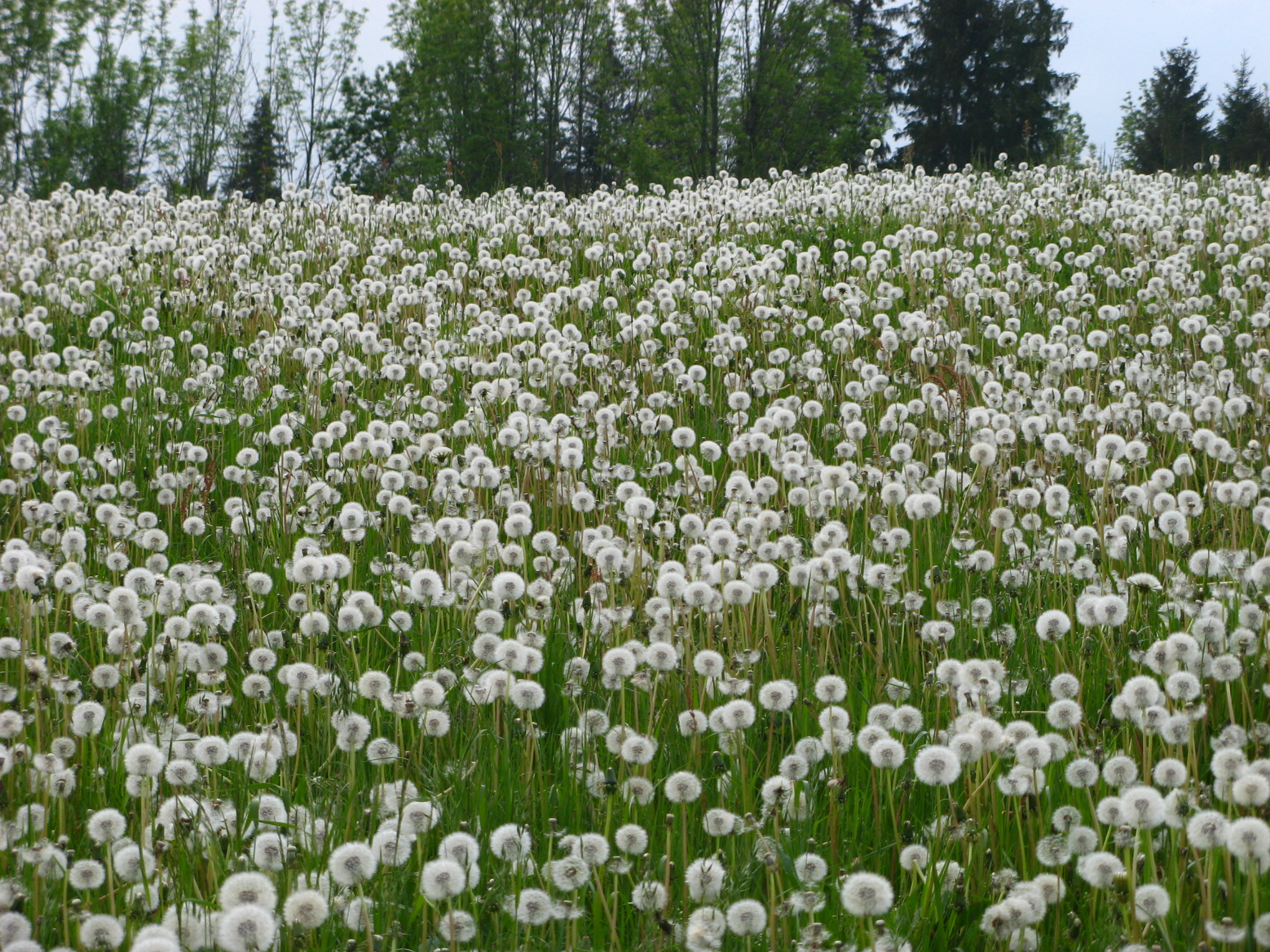 pampelišková louka